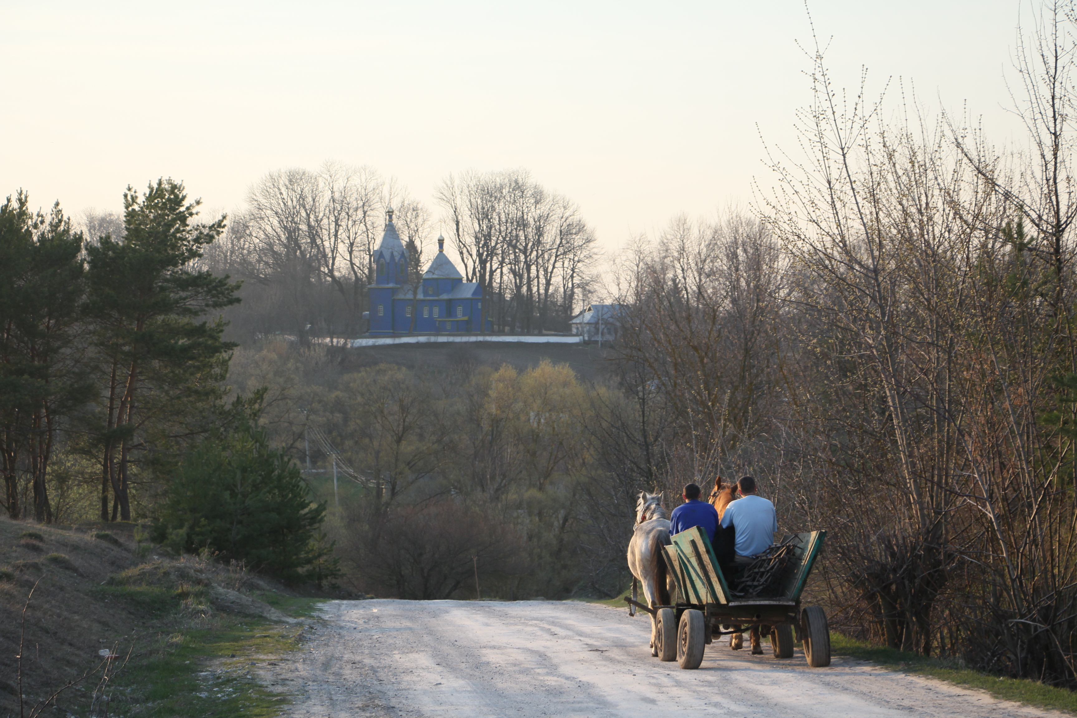 Дорога до села Печірна Лановецького району, Тернопільської області